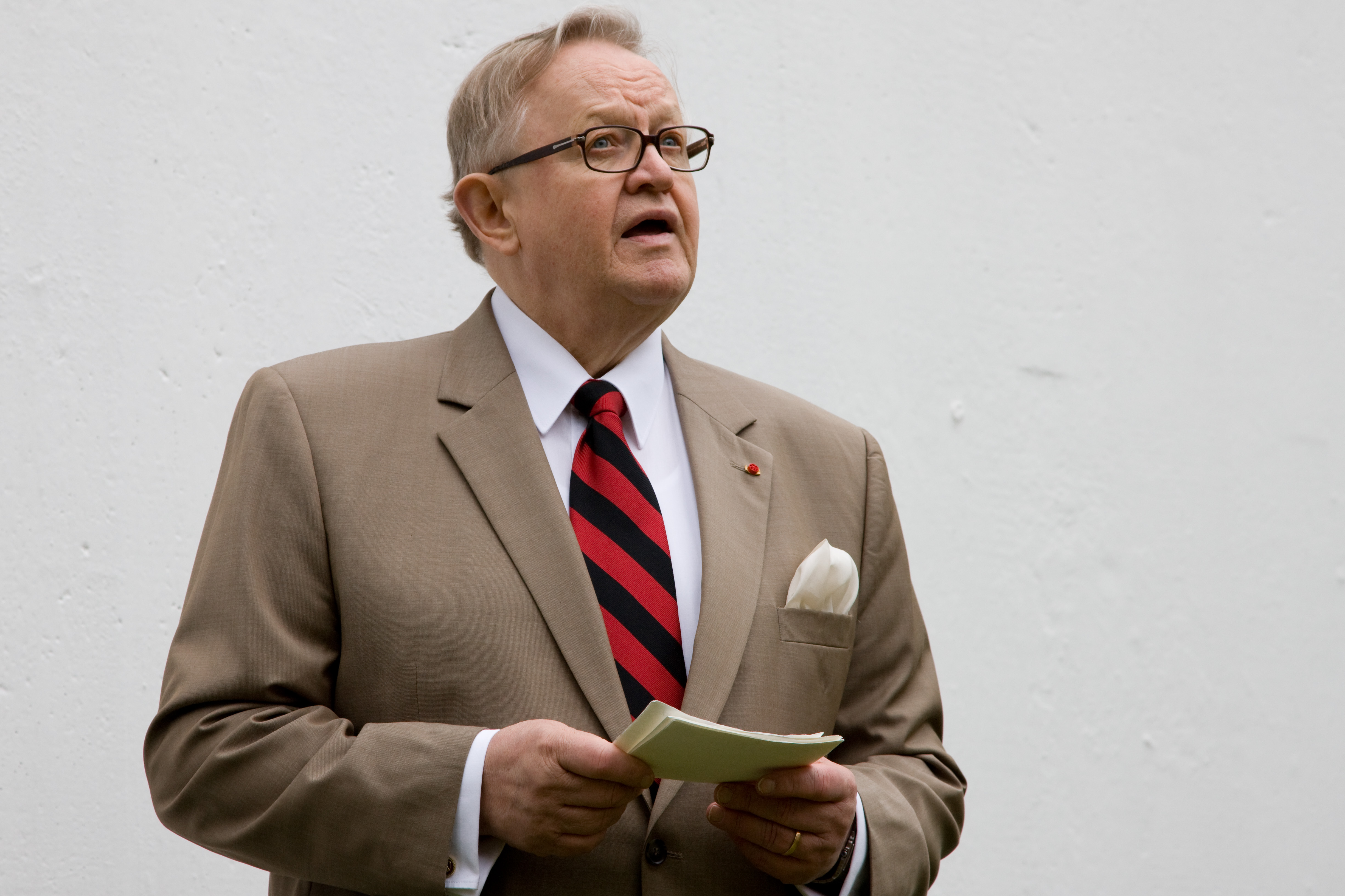 Martti Ahtisaari